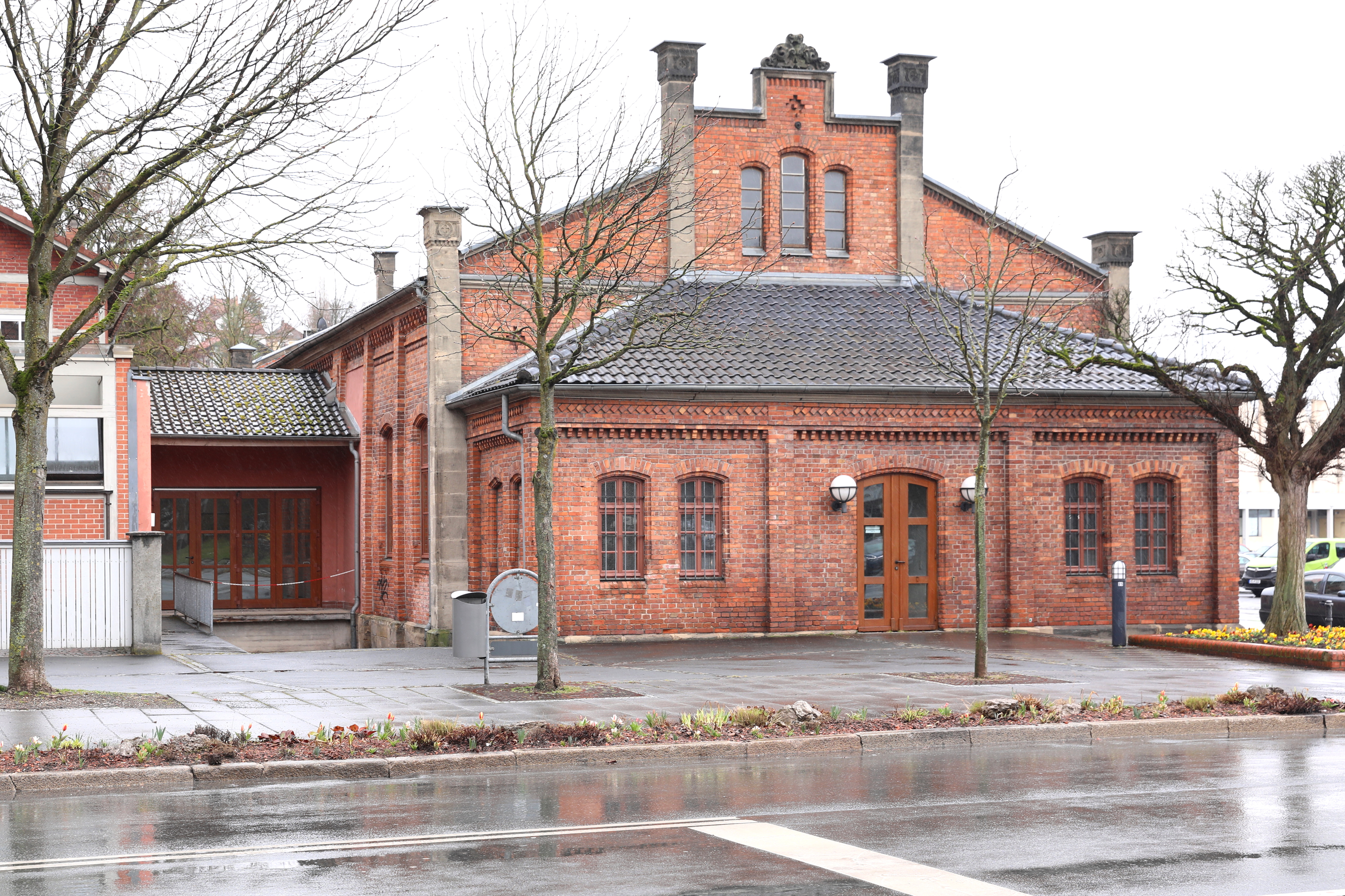 Coburg, Schützenstraße 1a/2 (Angerturnhallen)